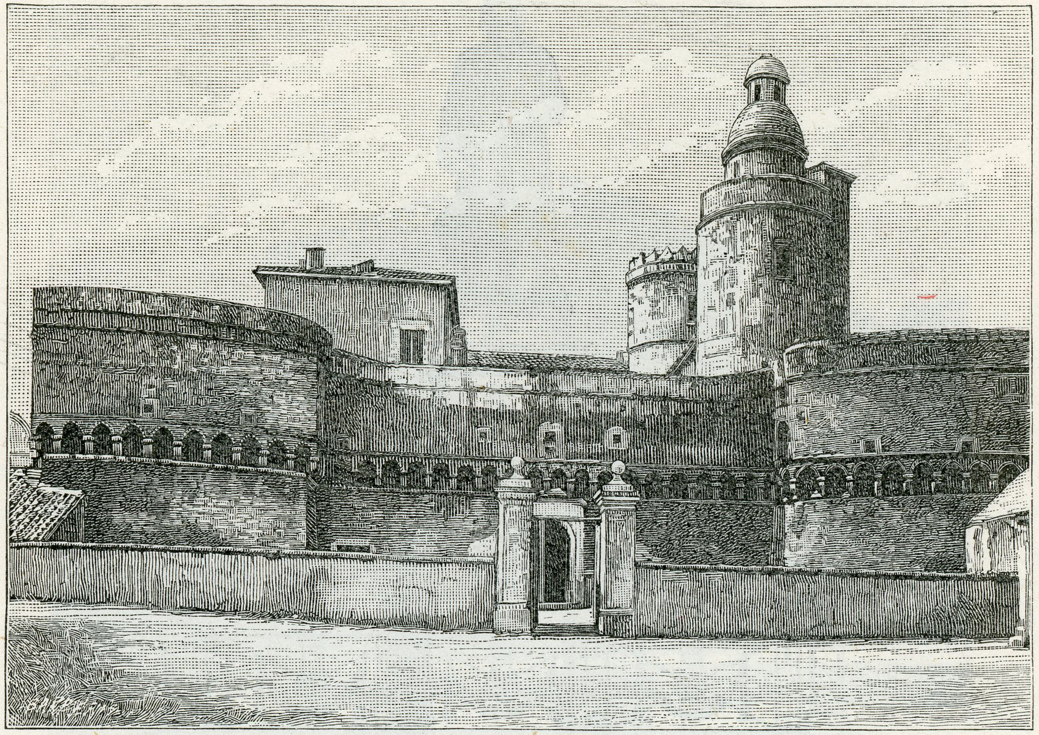 Vasto: il castello, visto dal lato di settentrione (xilografia di Barberis 1898).